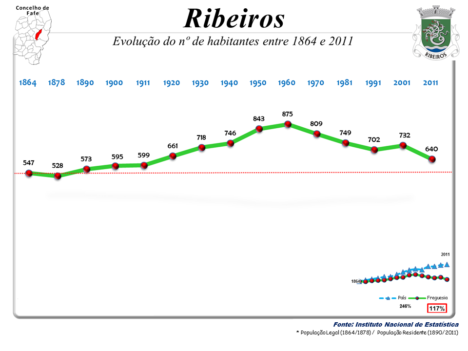 Censos 1864/2011